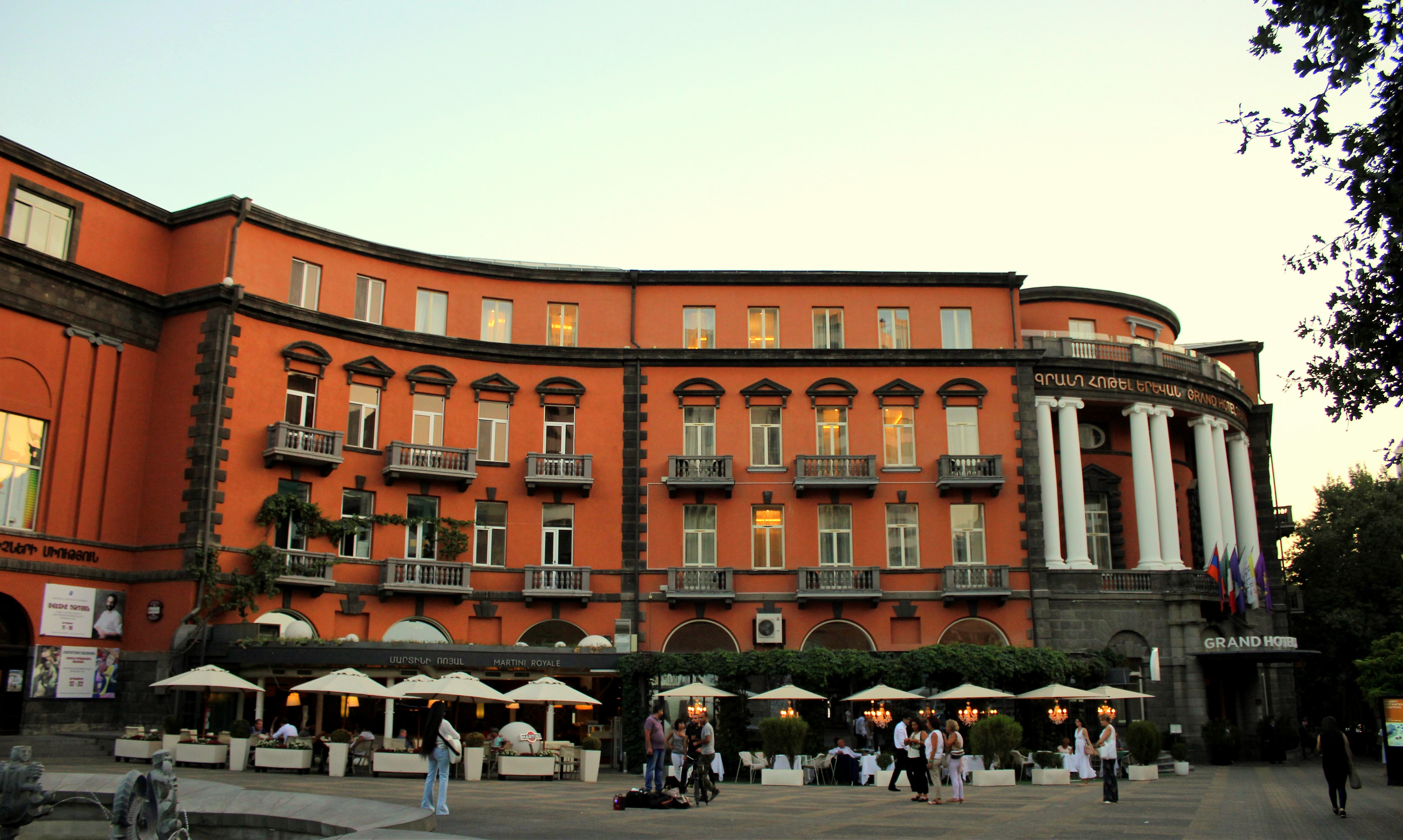 Հյուրանոց Երևան 6/176.3.3